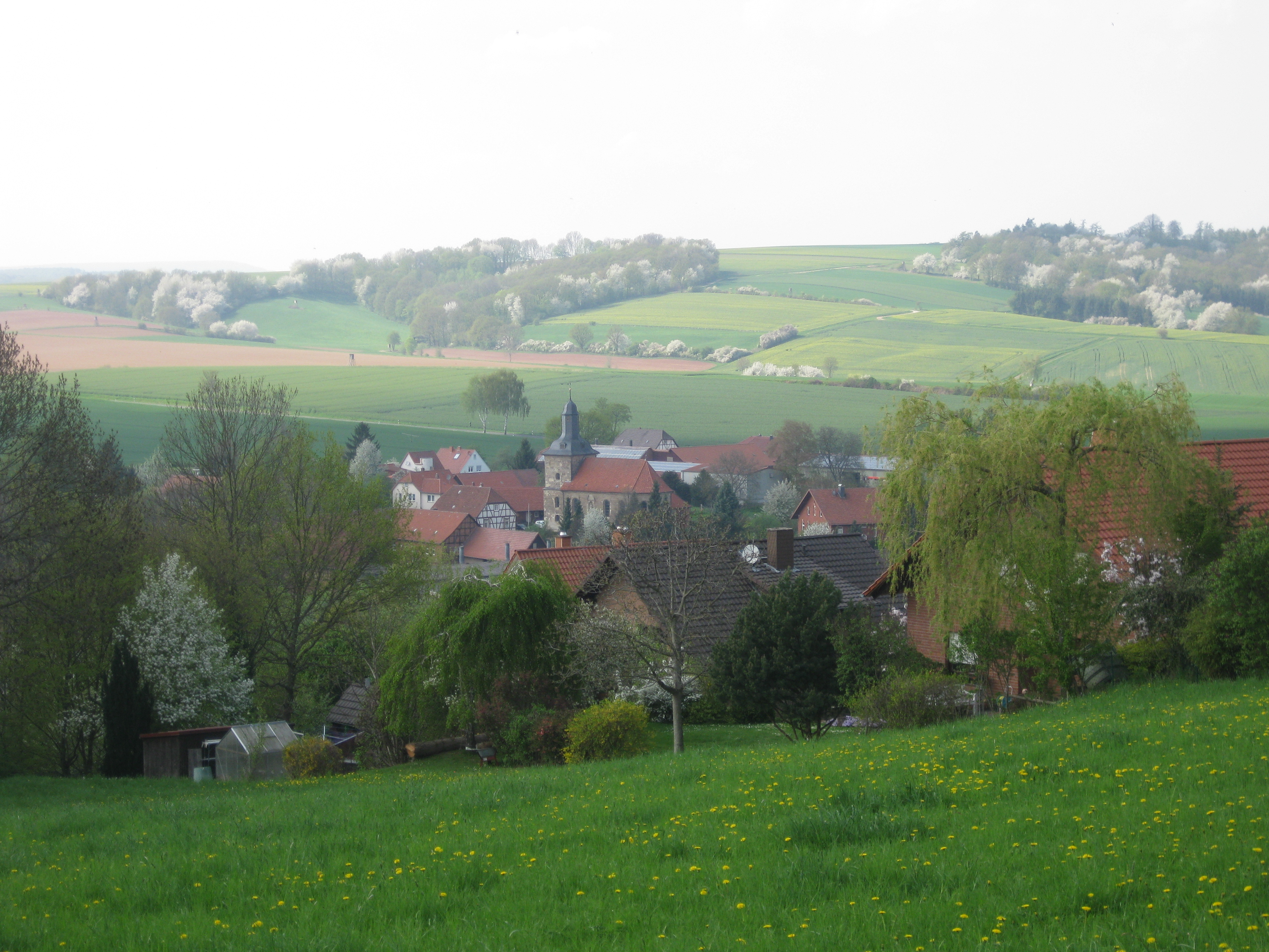 Blick vom Rand des Pferdeberges auf Immingerode